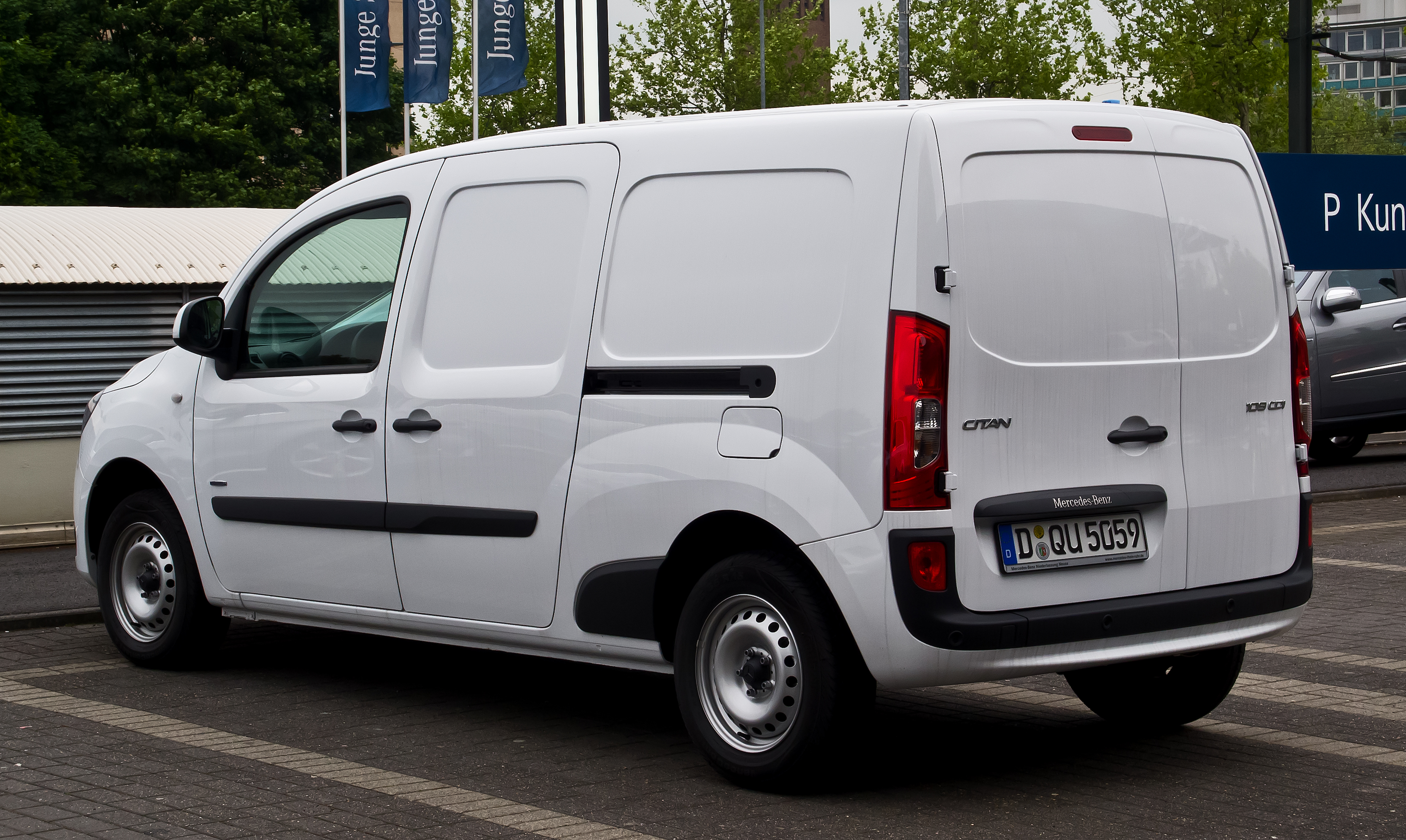 Mercedes-Benz Citan Kastenwagen Extralang 109 CDI BlueEFFICIENCY (W 415)